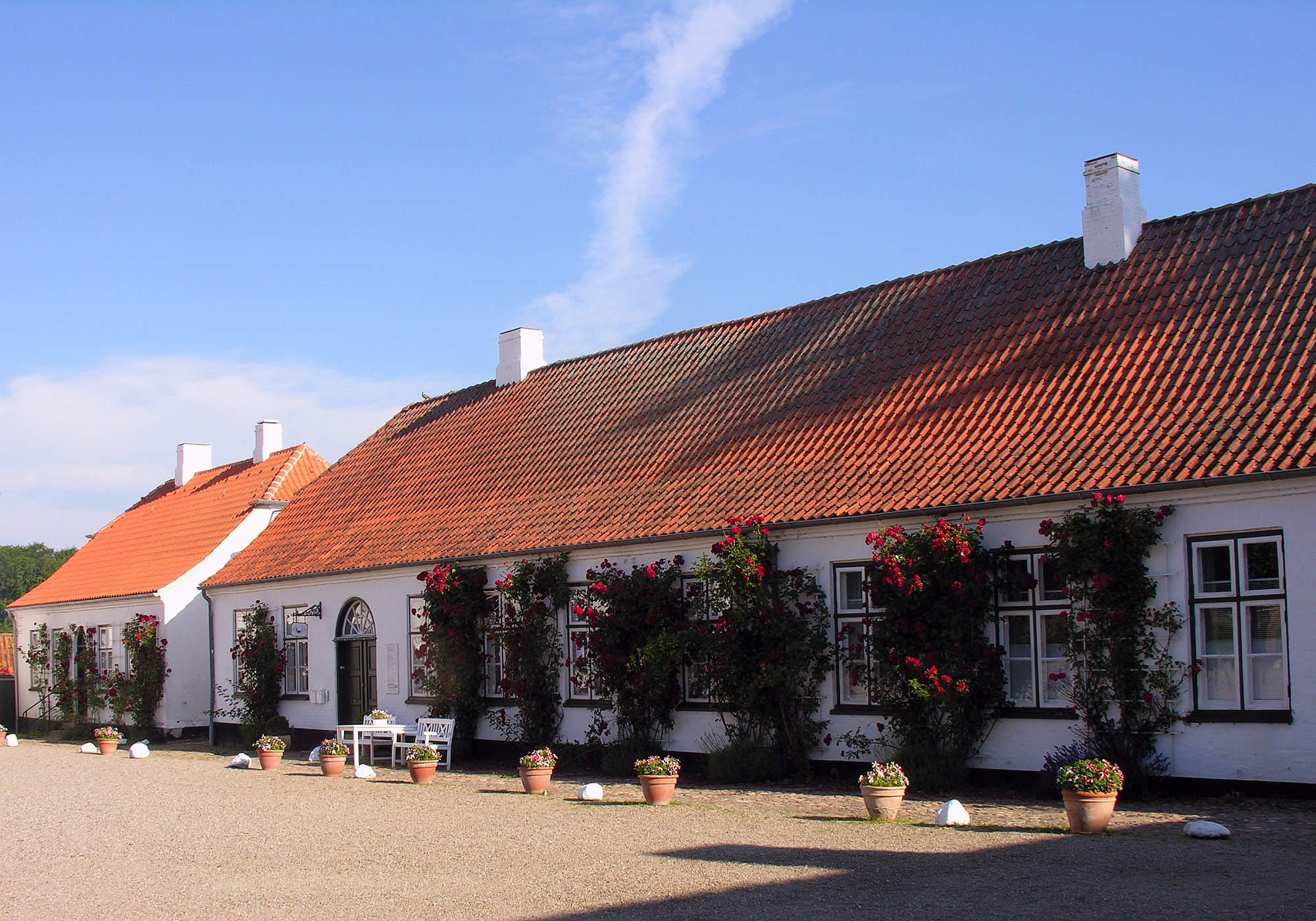 Kulturdenkmal 4.6 Wirtschaftshof und -gebäude von Schloss Glücksburg - Schleswig-Holstein Foto 2012 Wolfgang Pehlemann Steinberg/Ostsee DSCN0266